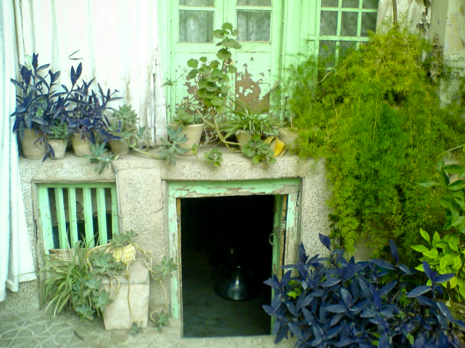 درب پایین مربوط به انباری است